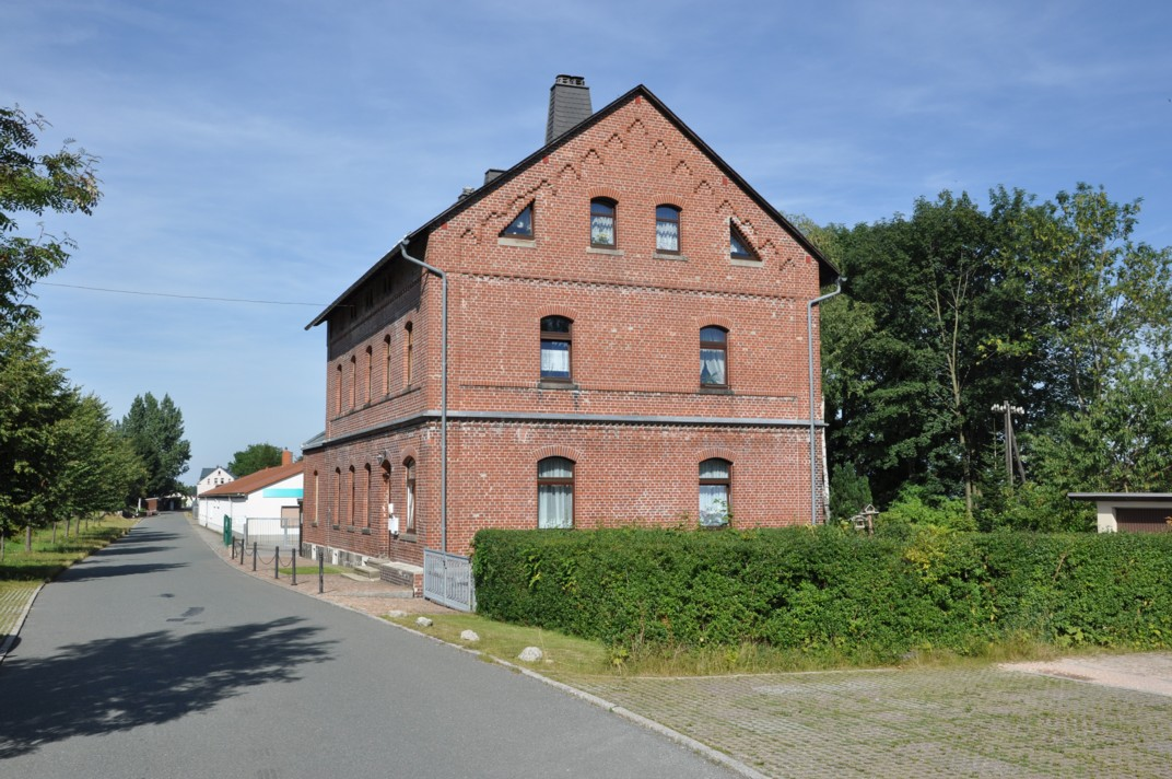 Bahnhof Schönheide Mitte This is a photograph of an architectural monument. It is on the list of cultural monuments of Schönheide